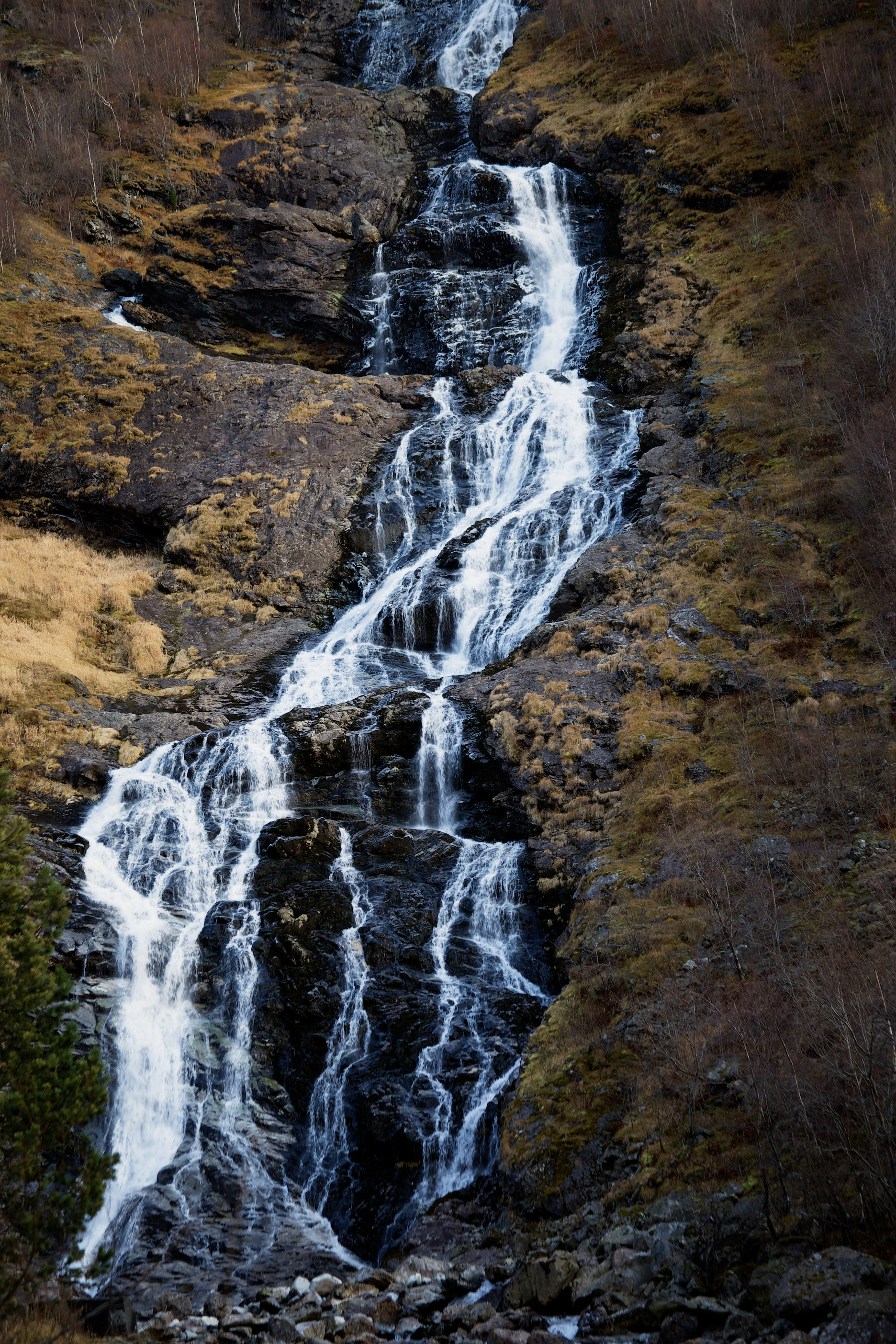 Hjellefossen